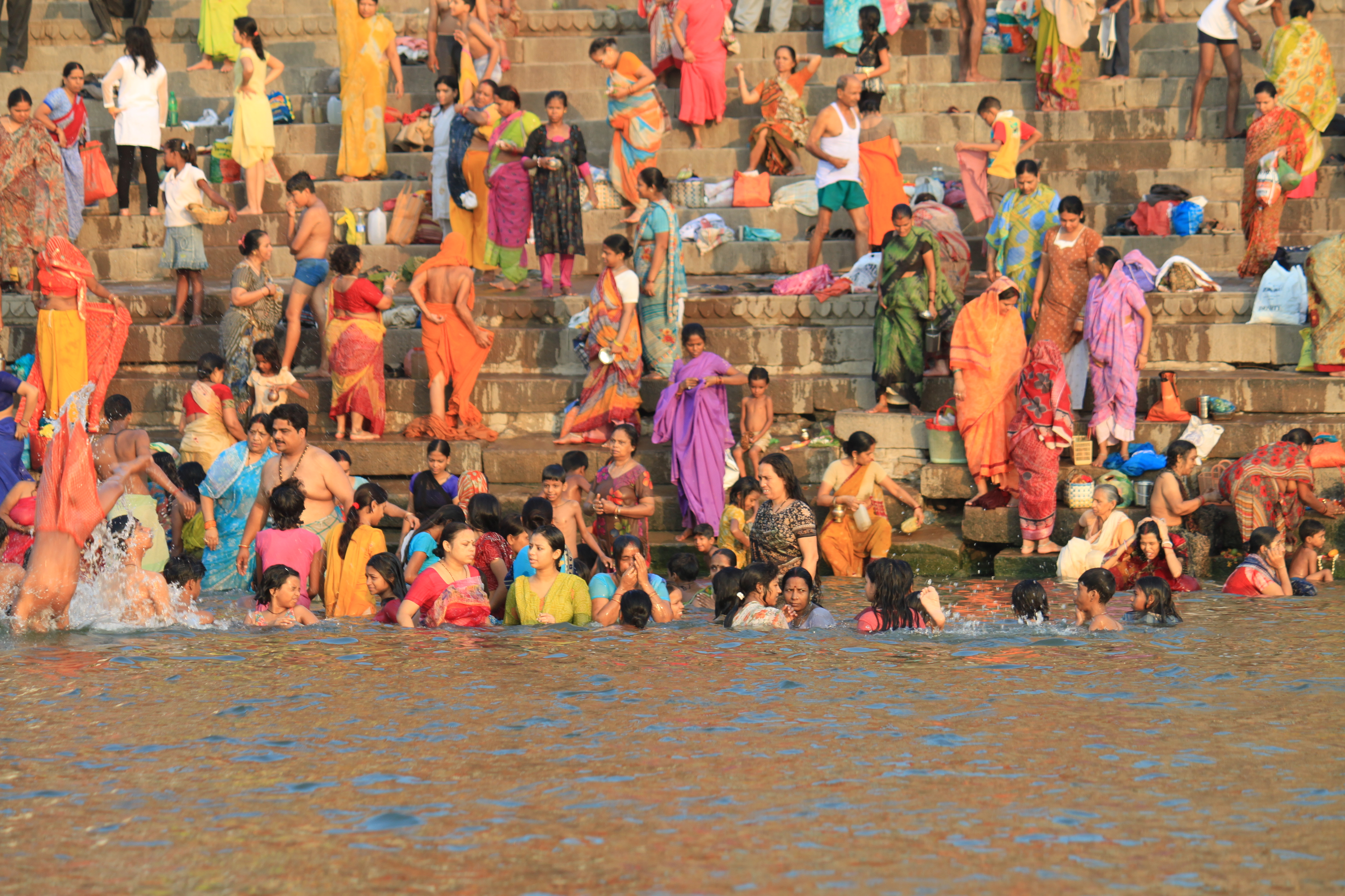 Ceremonia. Varanassi. Ciudad Sagrada. Rio Ganges